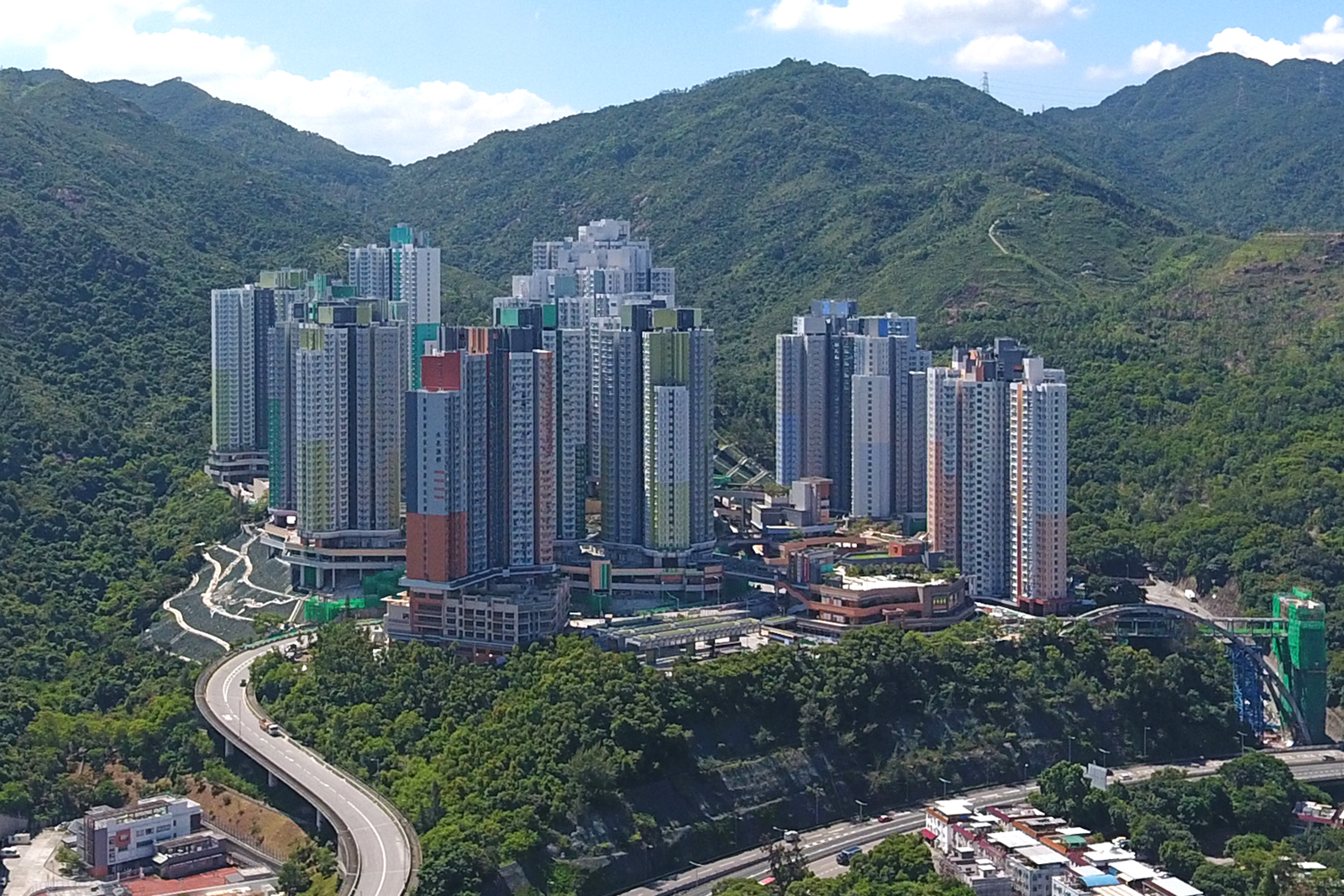 Shui Chuen O Estate